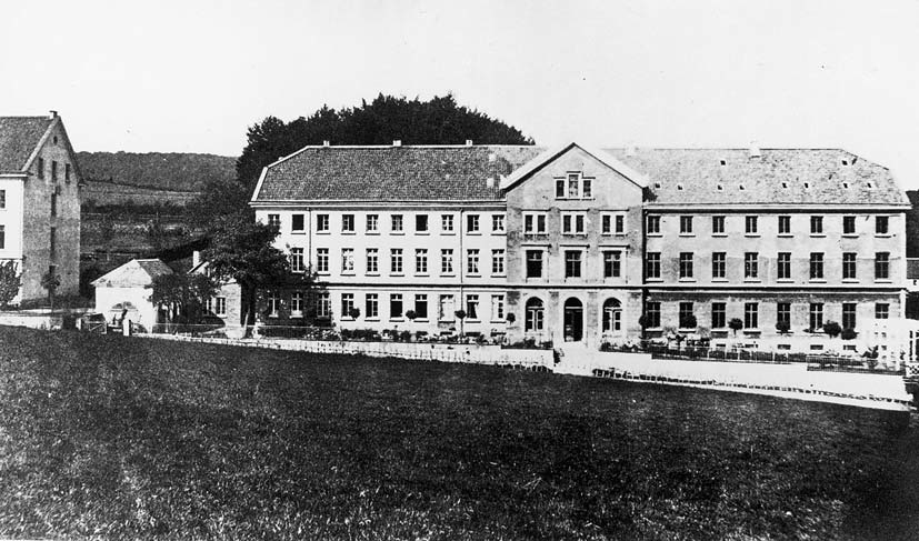 Barmer Missionshaus, ca. 1872 (Archiv- und Museumsstiftung Wuppertal der Vereinten Evangelischen Mission)